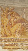 San Pietro di Morubio: Villa Verità, simbolo dell'amor profano, particolare di affresco della loggia.